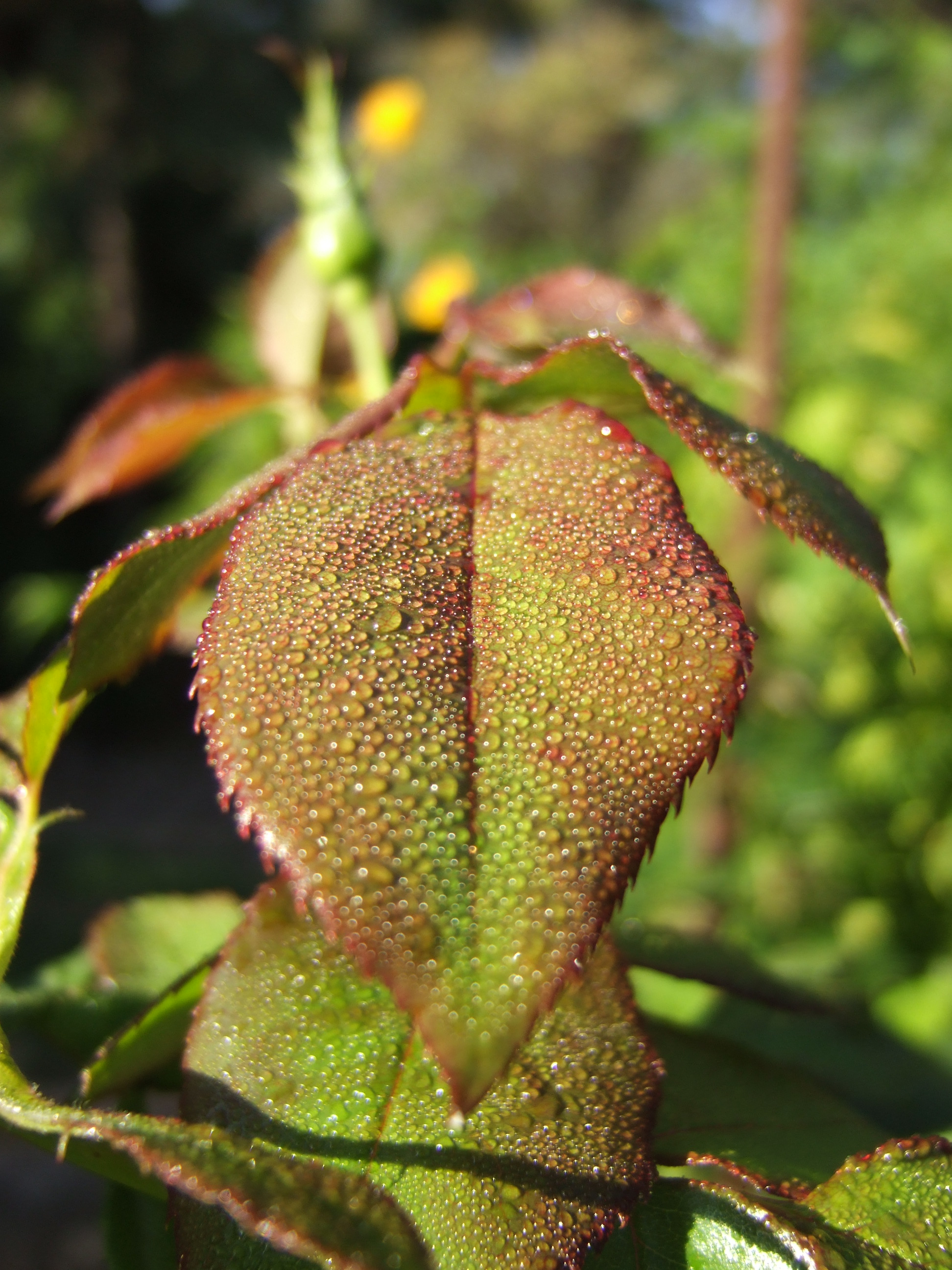 Rosa na liściu